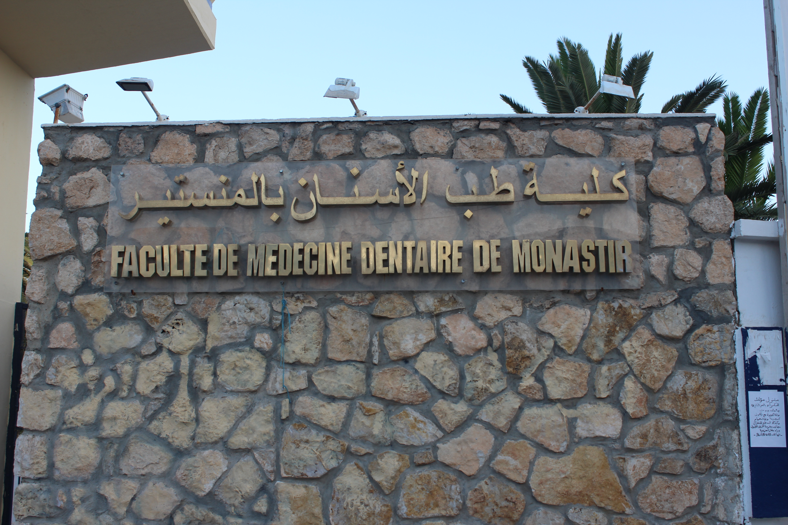 Monastir, Tunisie المنستير، تونس